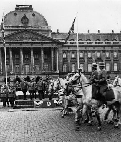 Vor dem königlichen Schloß in Brüssel. Parade vor dem Führer einer Armee. Pro.Kp. 612